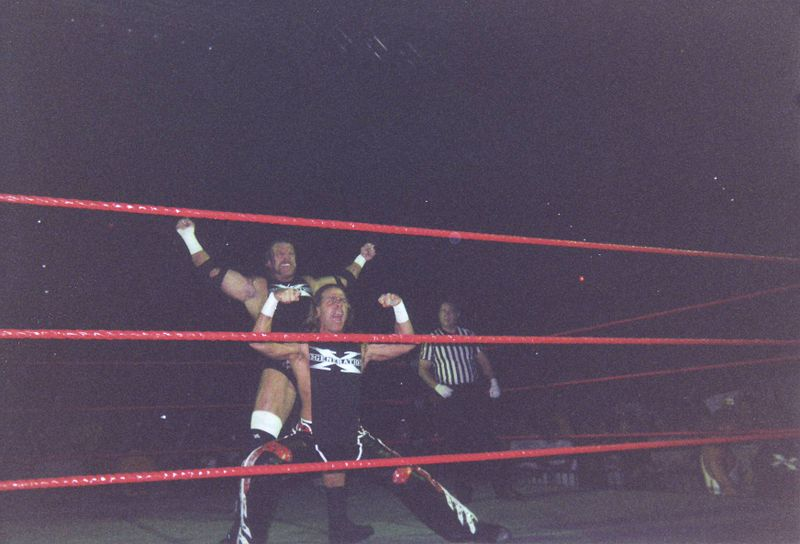 DX Signature Pose